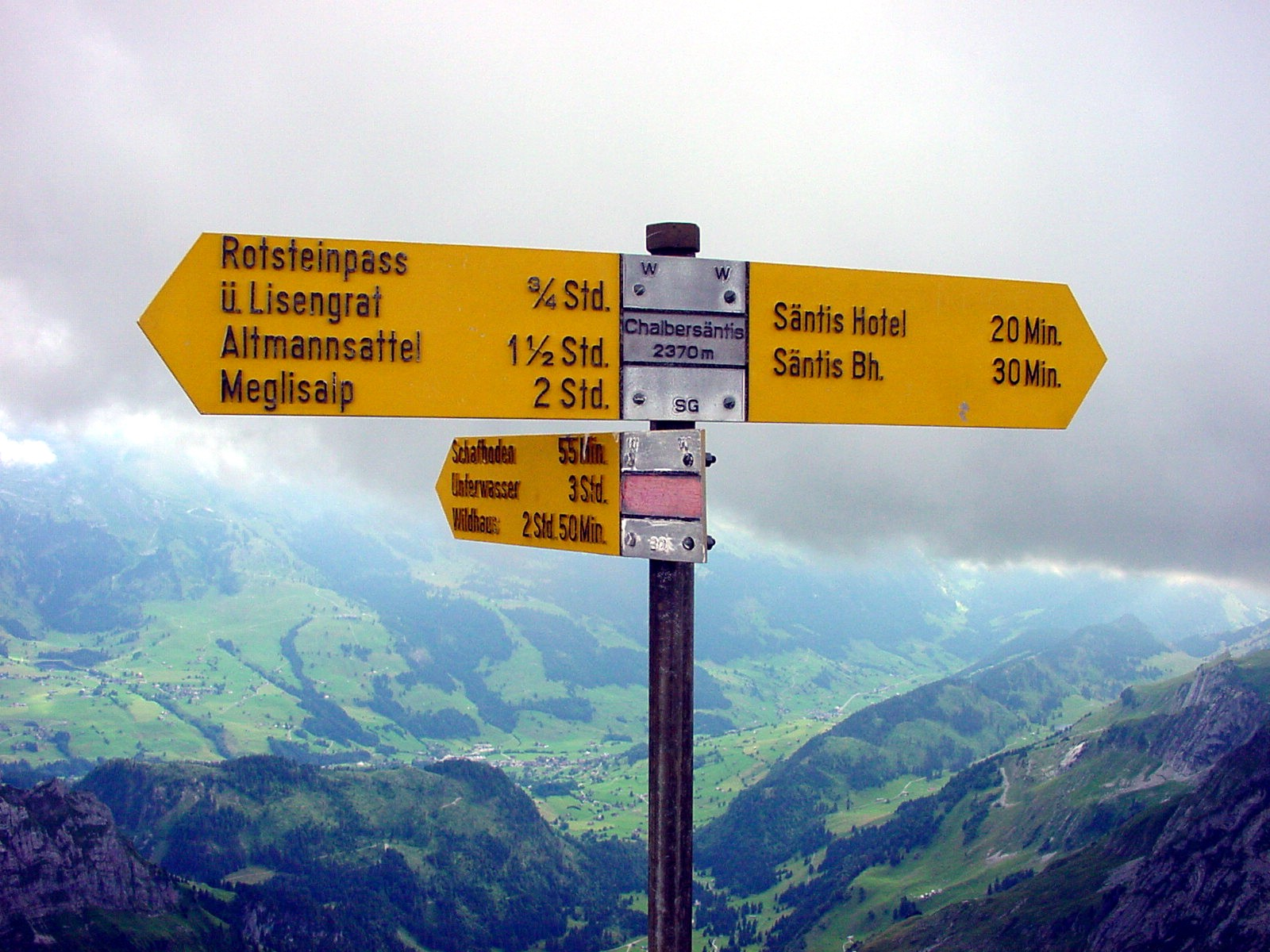 Wegabzweig etwas unterhalb des Chalbersäntis-Gipfels im Lisengrat zwischen Säntis und Rotsteinpass (Alpstein).